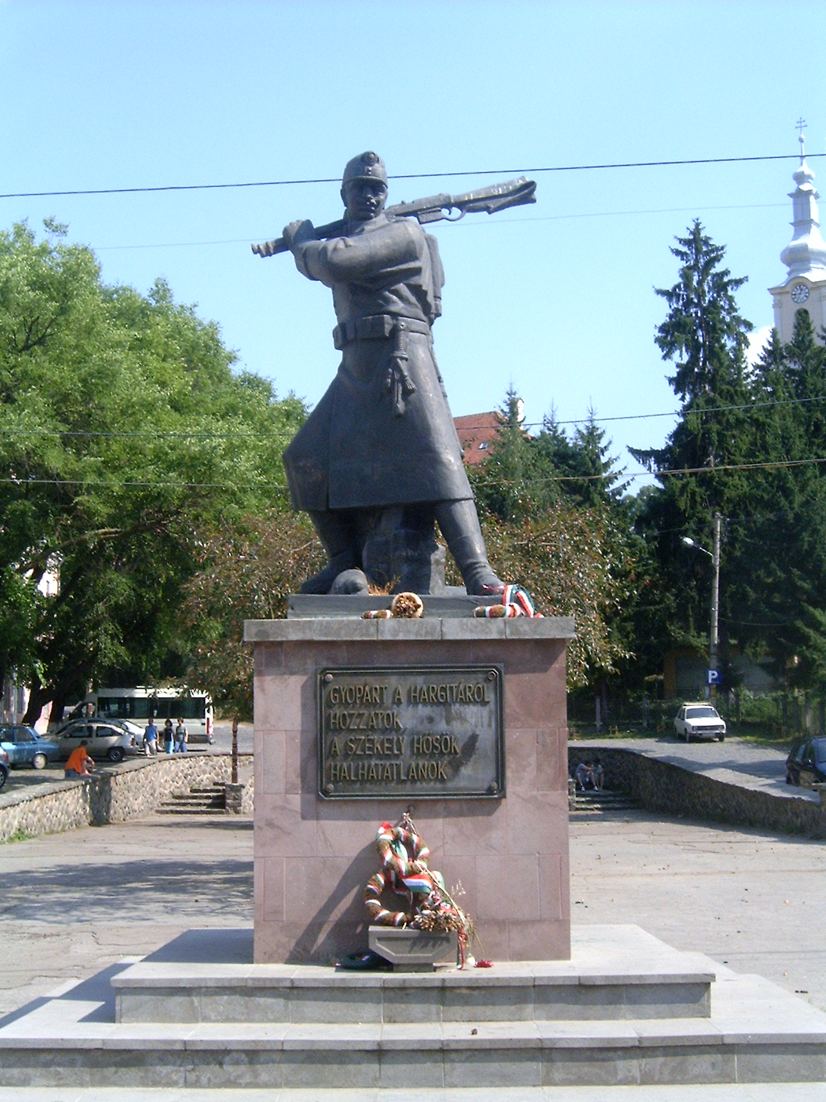 Vasszékely szobra, Székelyudvarhely